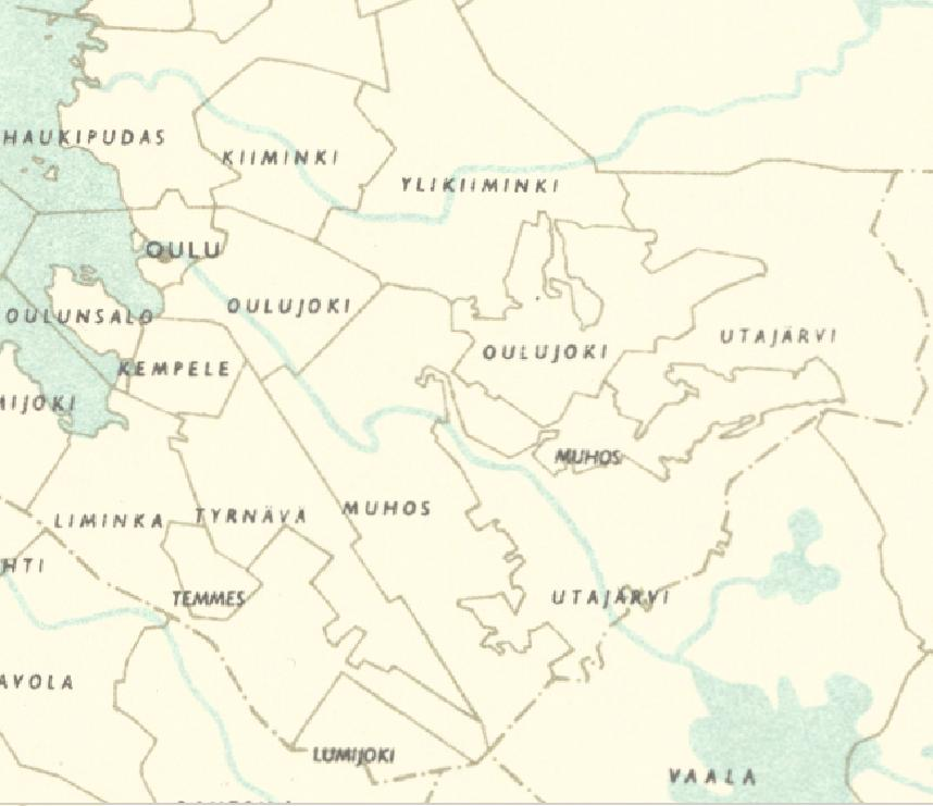 Suomen tilastokartta 1960: Oulu ja sen lähikunnat